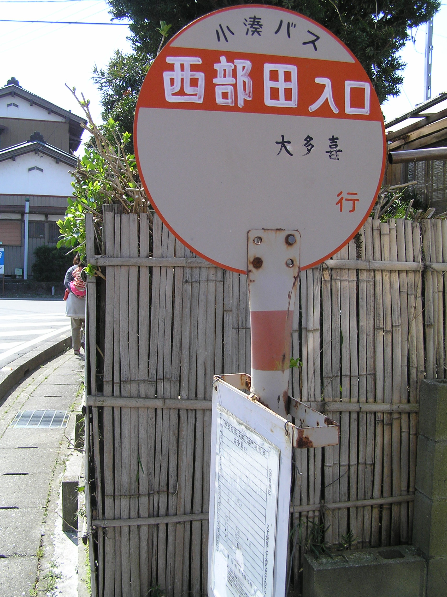 西部田入口 バス停 ～photo by Autumn Snake【おぉたむすねィく探検隊】